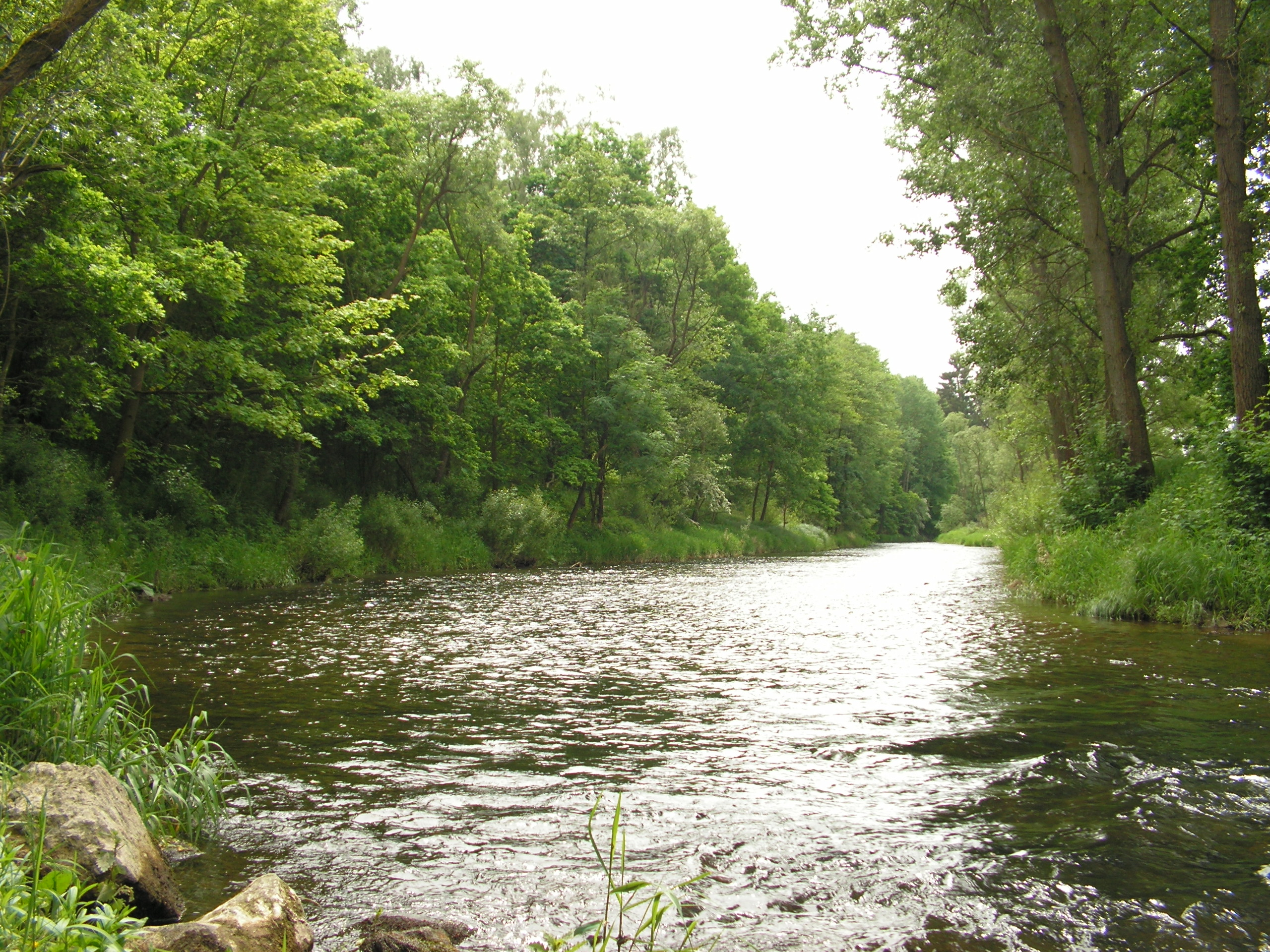 Poslední ohyb řeky Želivky před ústím.